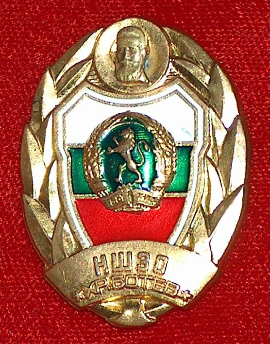 Нагръден знак НШЗО Христо Ботев